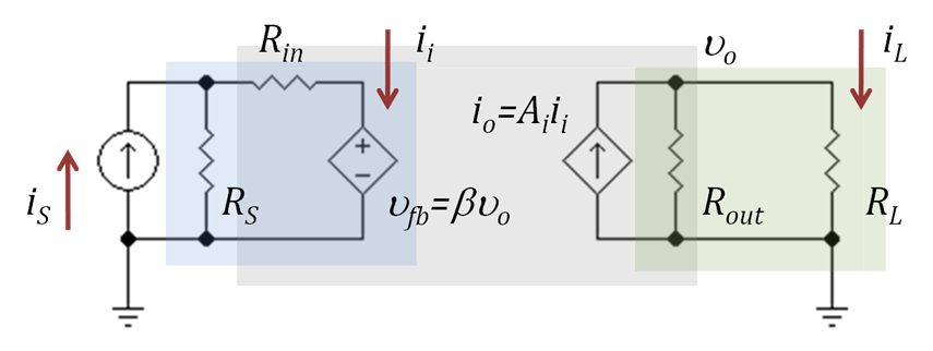 Bipolar current amplifier